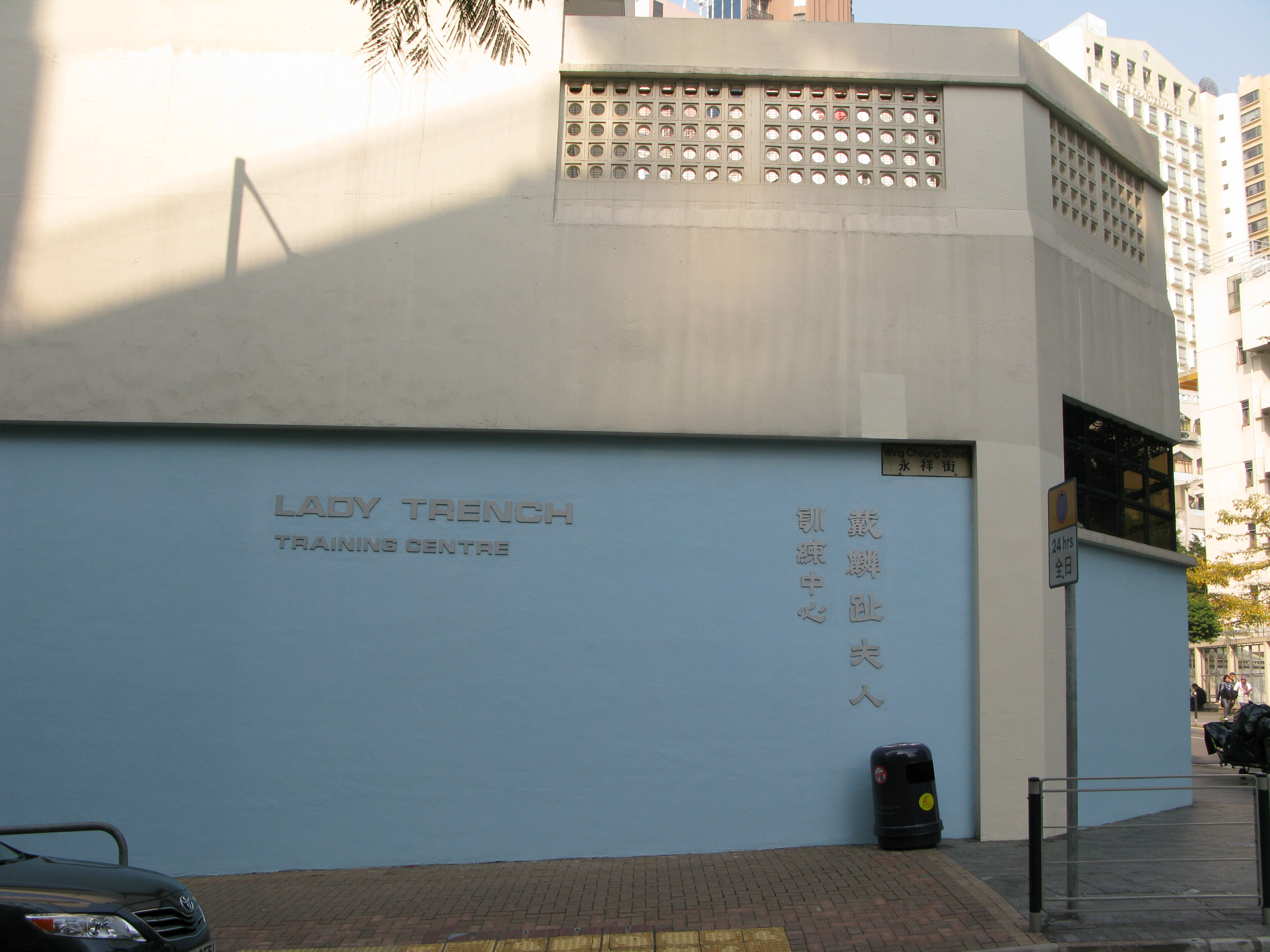 中文（香港）: 香港灣仔摩理臣山戴麟趾夫人訓練中心